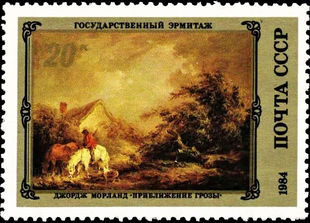 Почтовая марка СССР. Джордж Морланд. «Приближение грозы». Номер в каталоге ЦФА 5485